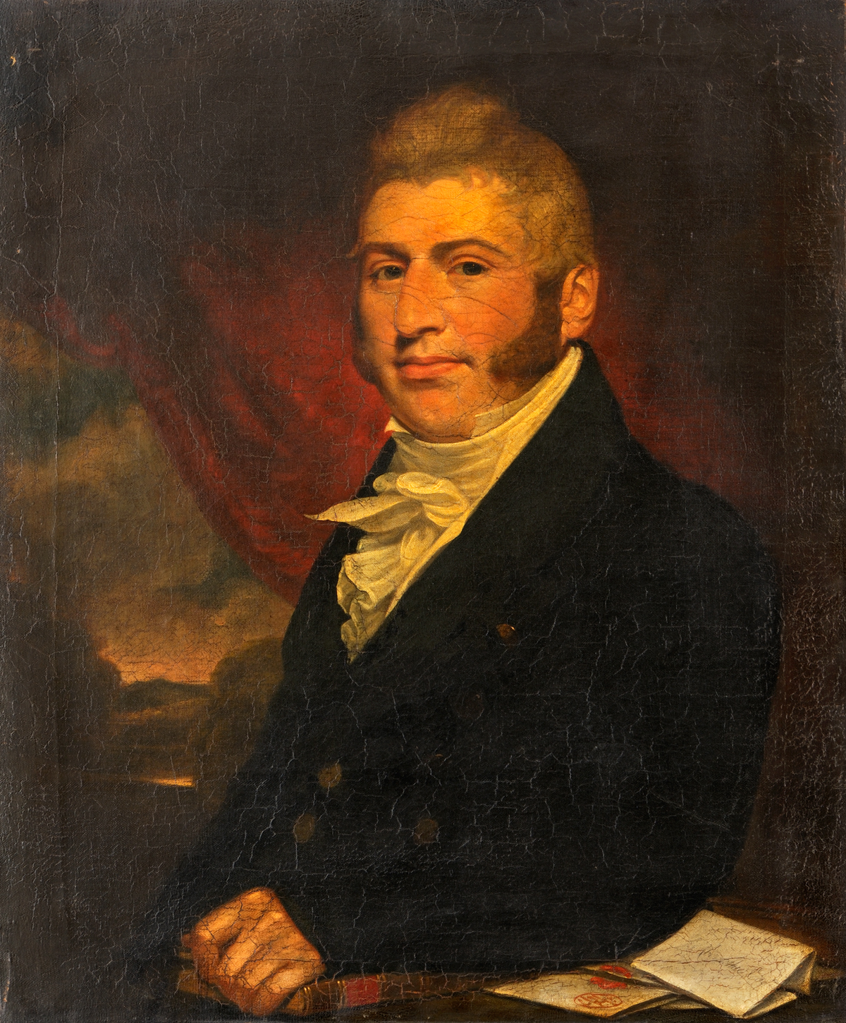 John Abercrombie (1780–1844)